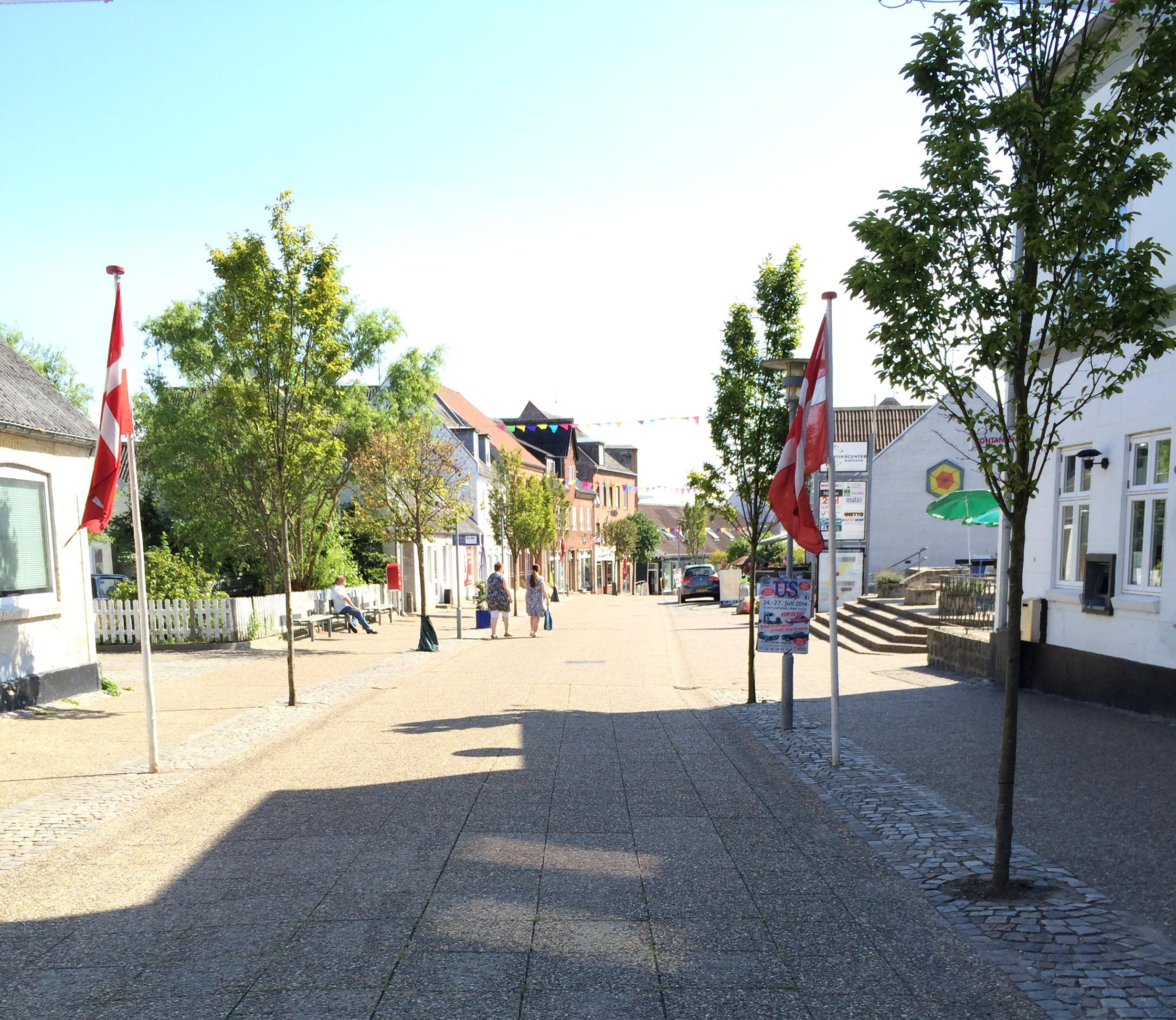 Storegade i Hadsund